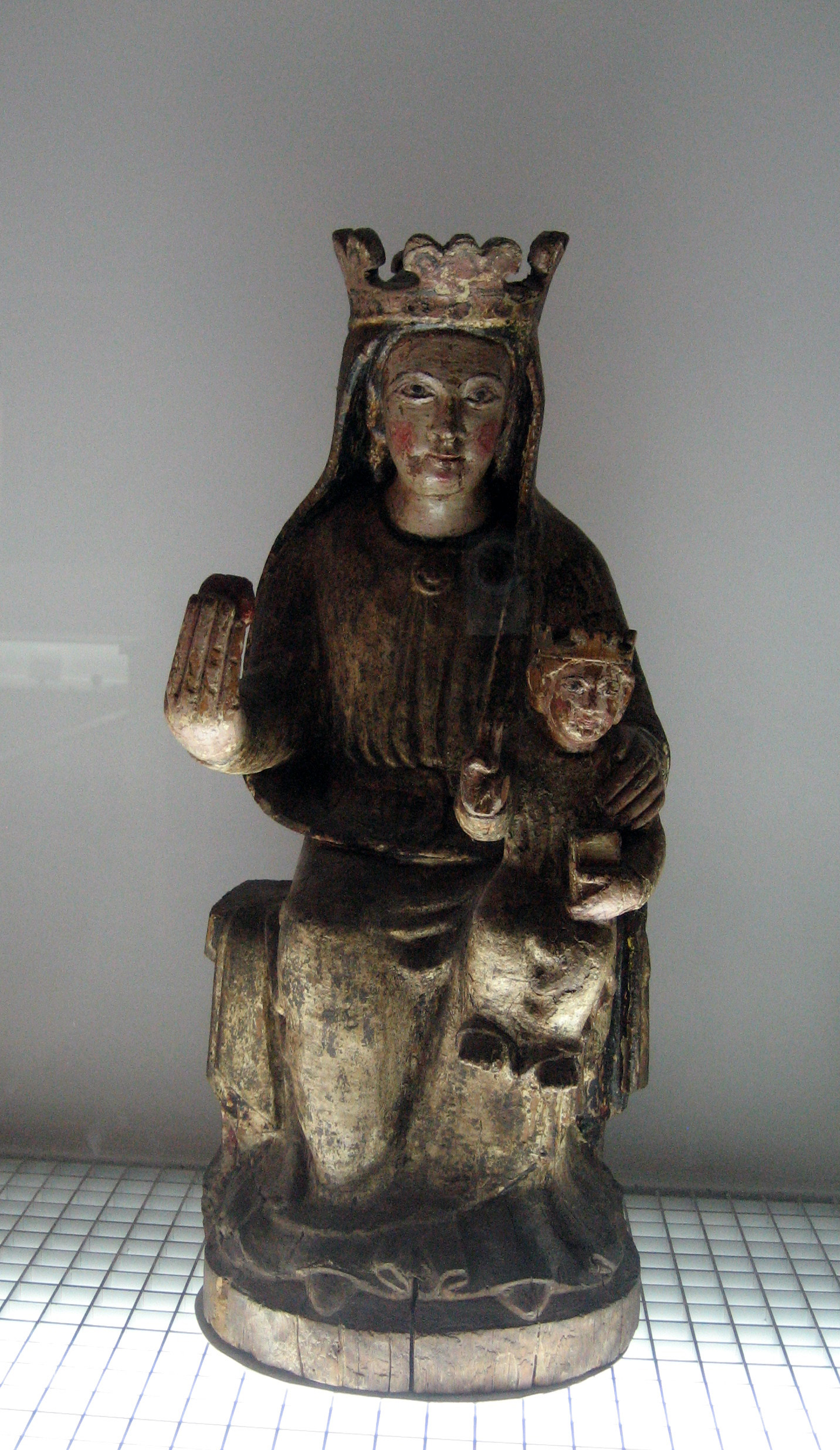 Mare de Déu de la Muntanya de Caregue de la comarca catalana del Pallars Sobirà (Spain)